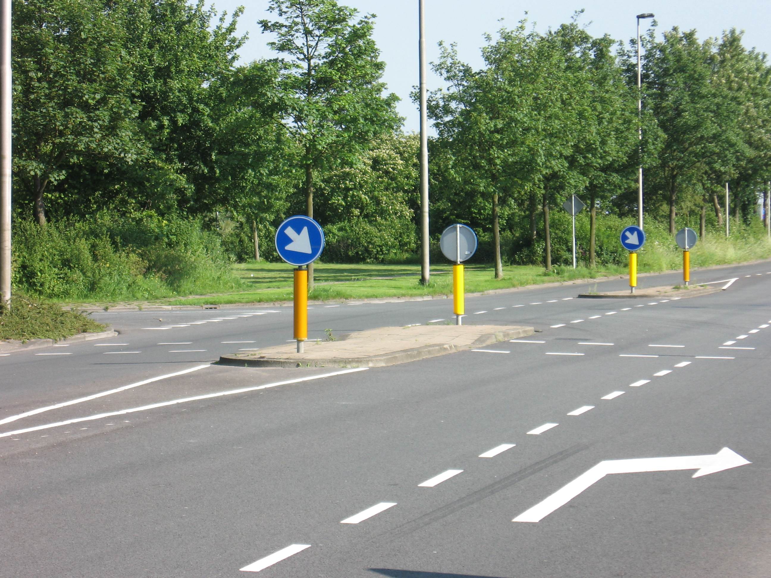 vluchtheuvel